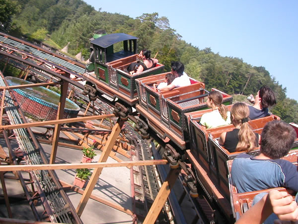 Achterbahn Fränkisches Wunderland